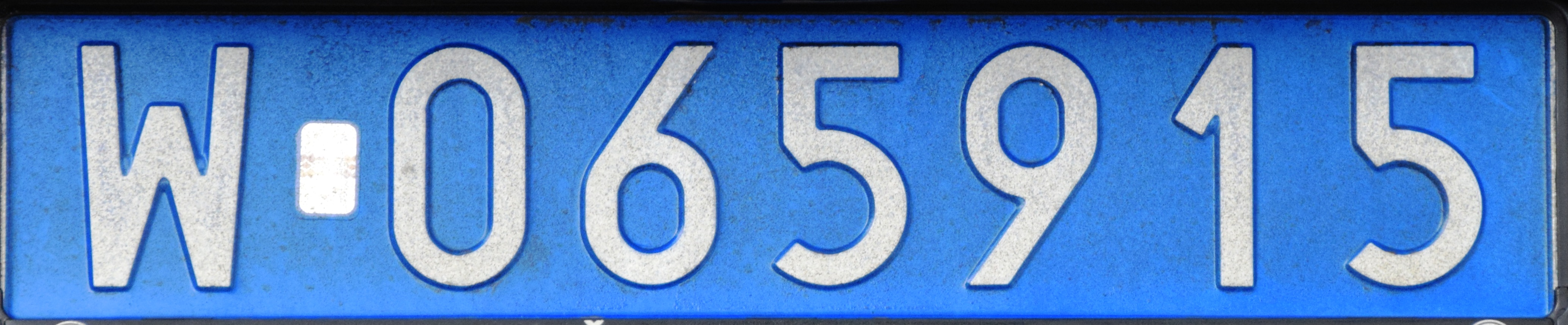 CD kentekenplaat van Polen